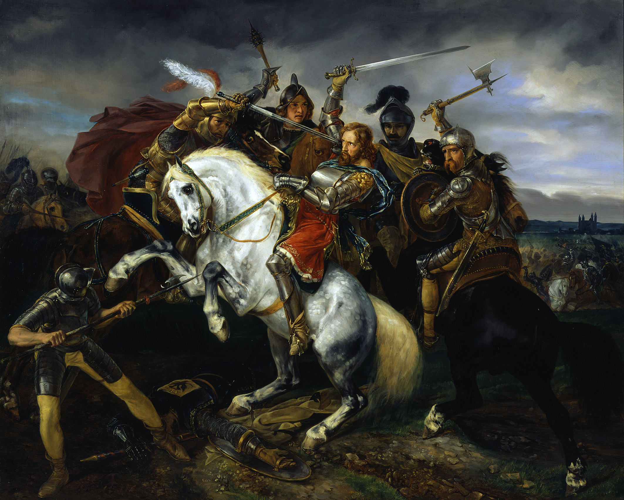 Tod Adolfs von Nassau in der Schlacht von Göllheim Simon Meister, Maler Koblenz, 1829